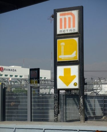 Señalamiento que informa la ubicación de la estación de metro Terminal Aerea